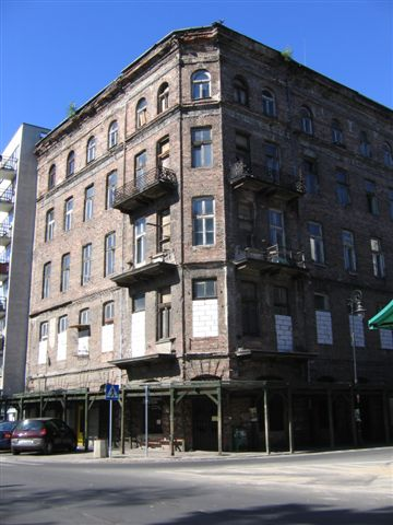 Majer Wolanowski's house (14, Próżna Str., Warsaw, Poland, July 2006)